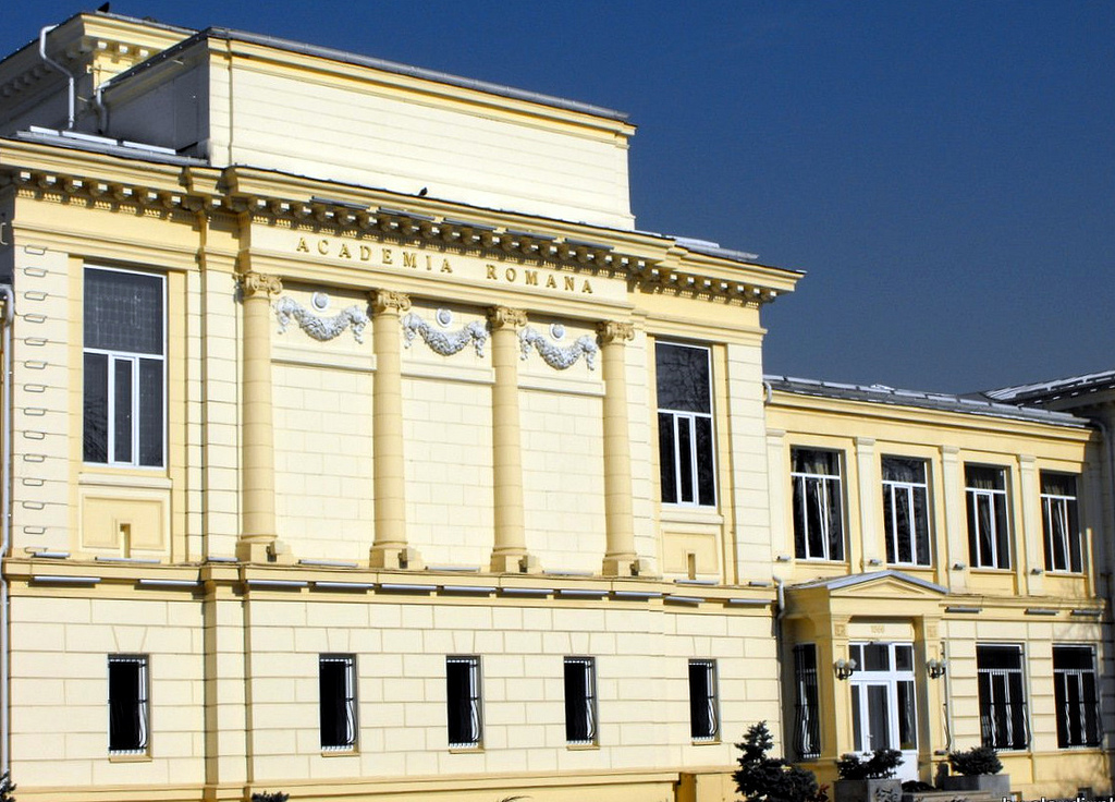 ACADEMIA ROMANA